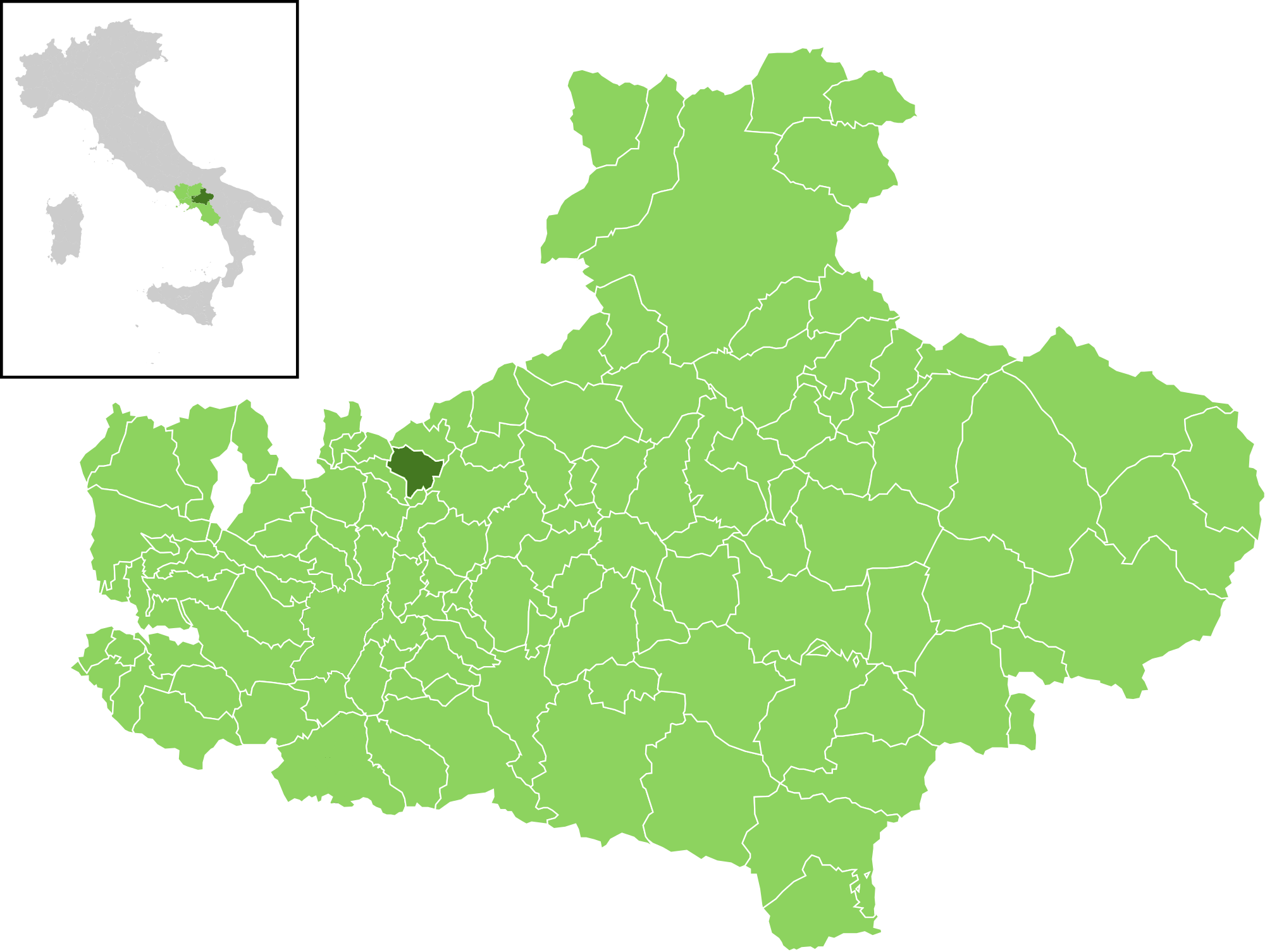 Posizione del comune all'interno della provincia di Avellino